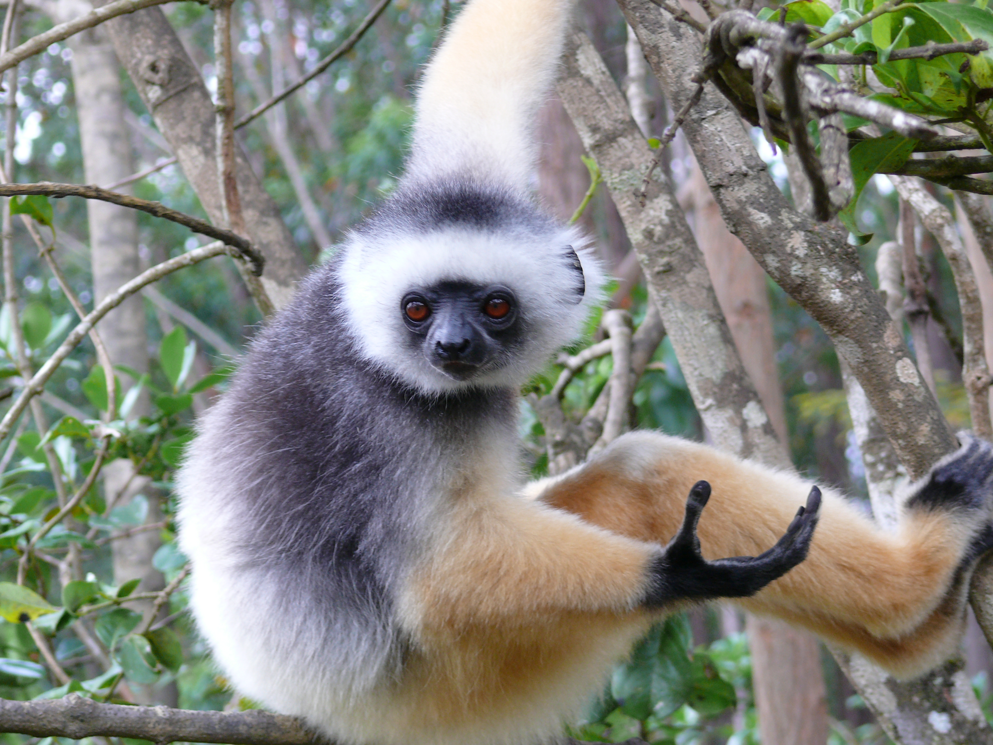 Propithèque à diadèmes